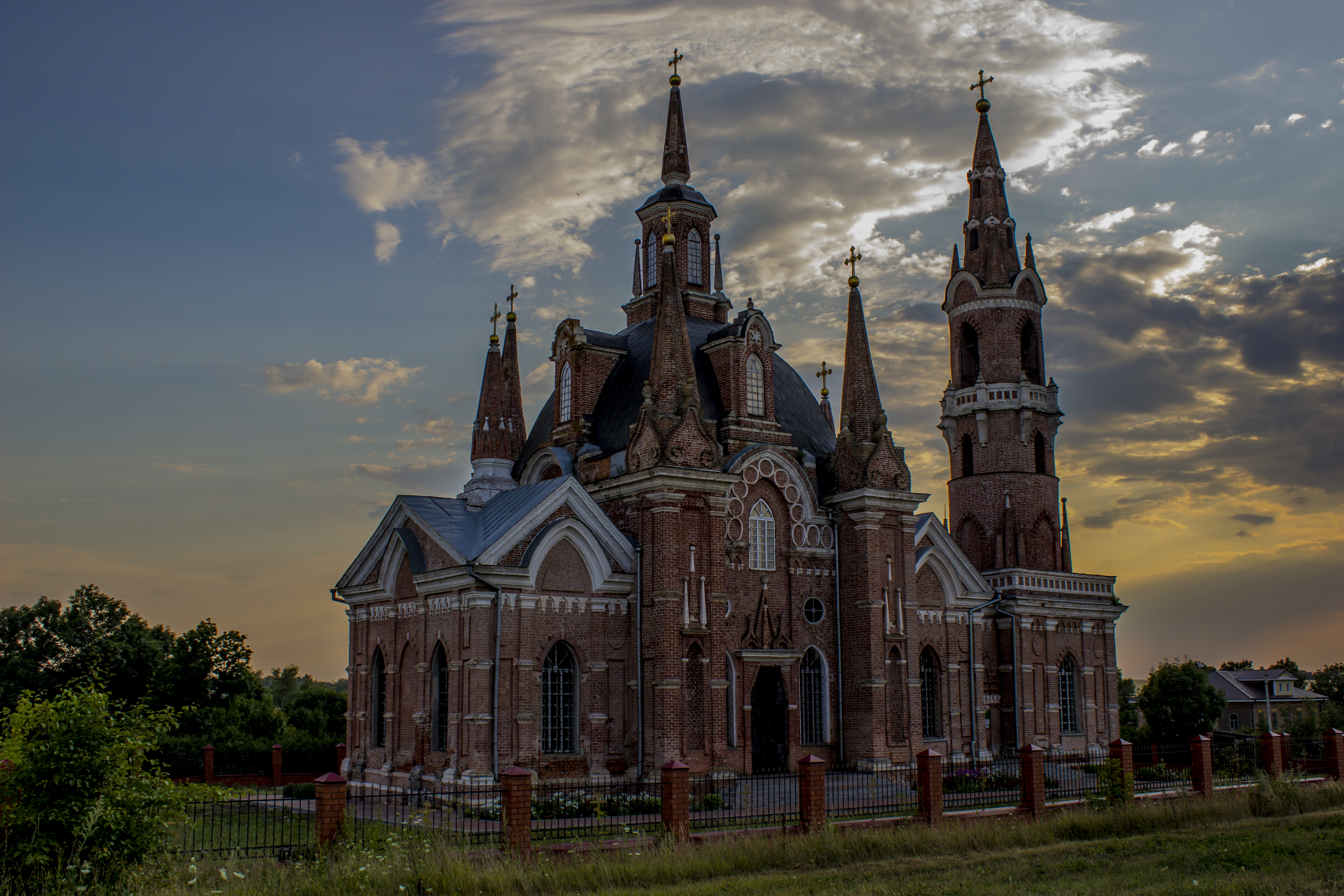 Церковь Знамения: Вешаловка, Липецкий район, Липецкая область